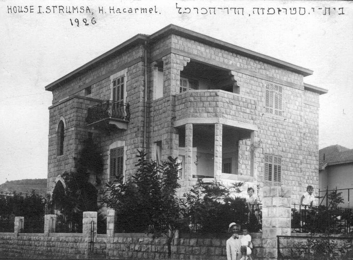 בית סטרומזה בהדר הכרמל